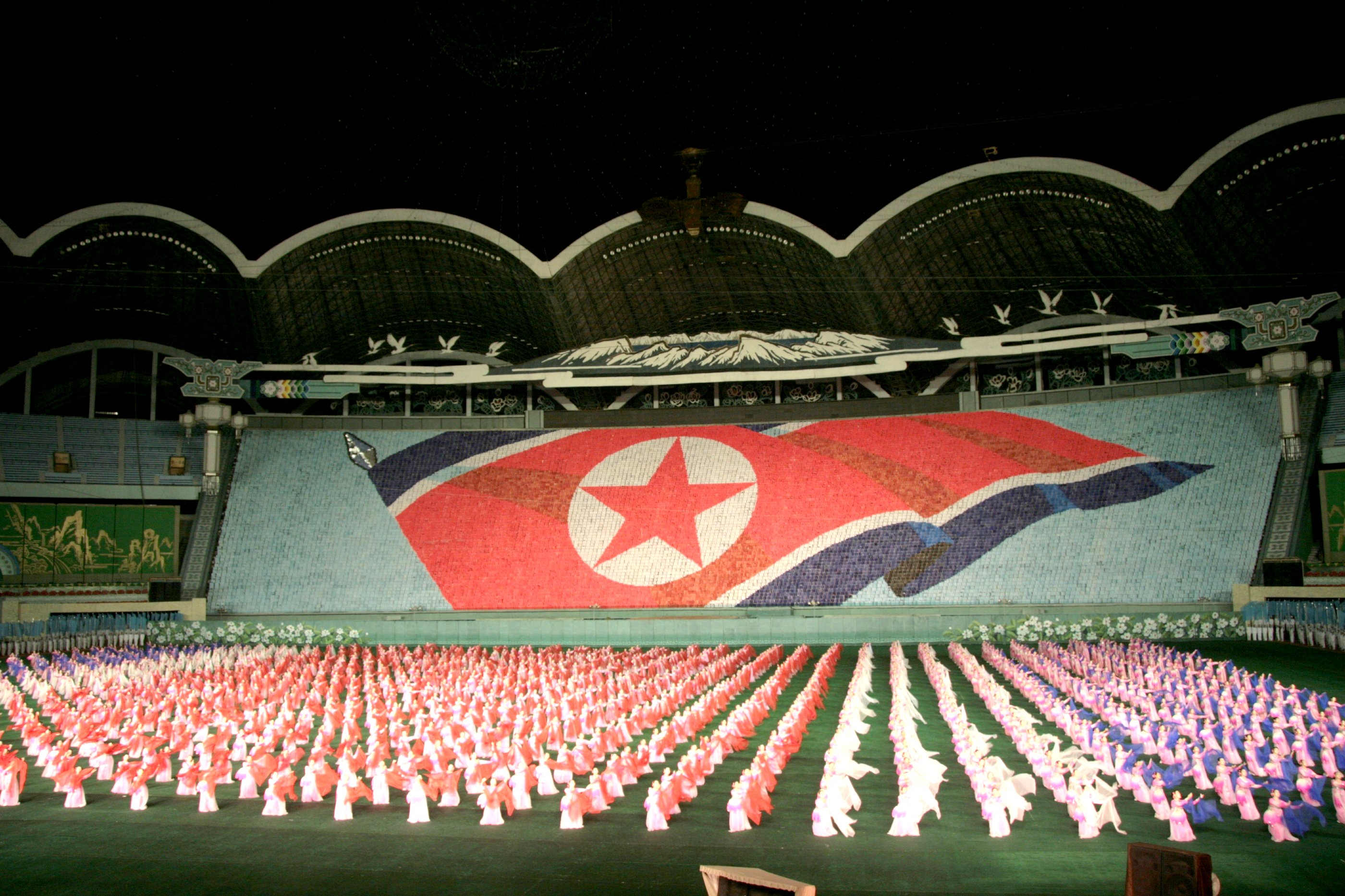 Rungrado May Day Stadium in Pyeongyang, North Korea